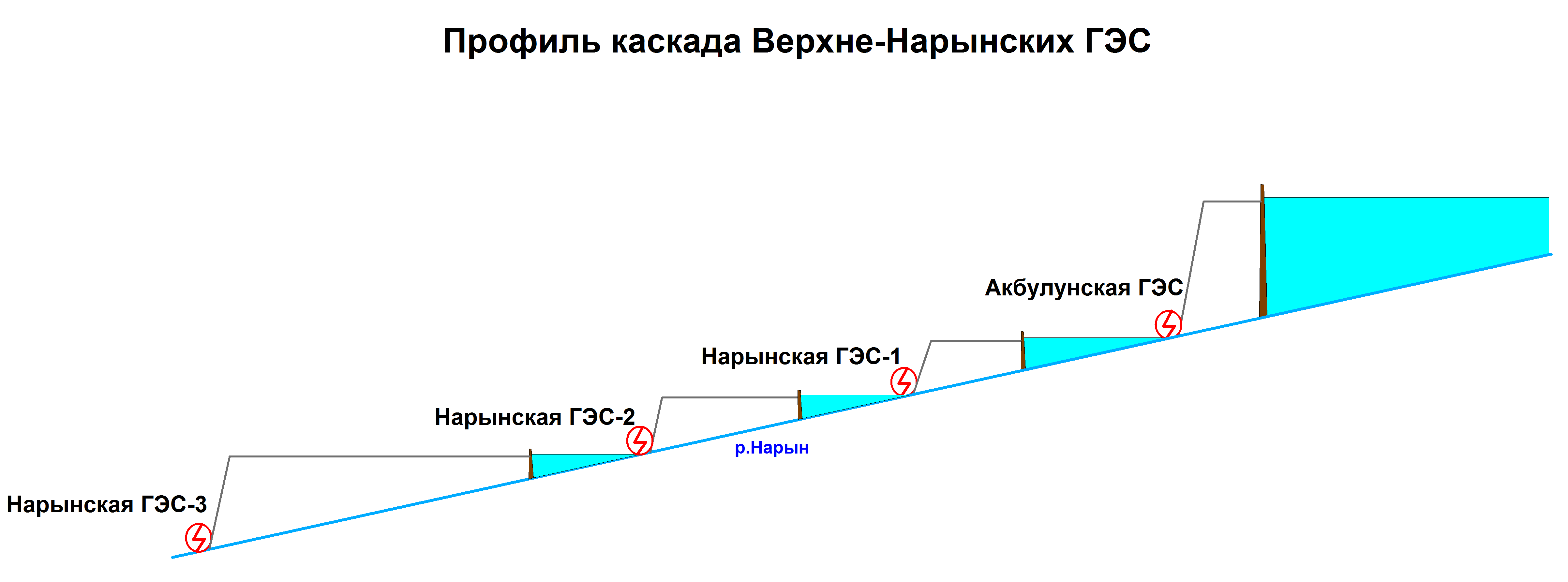 Профиль каскада Верхне-Нарынских ГЭС